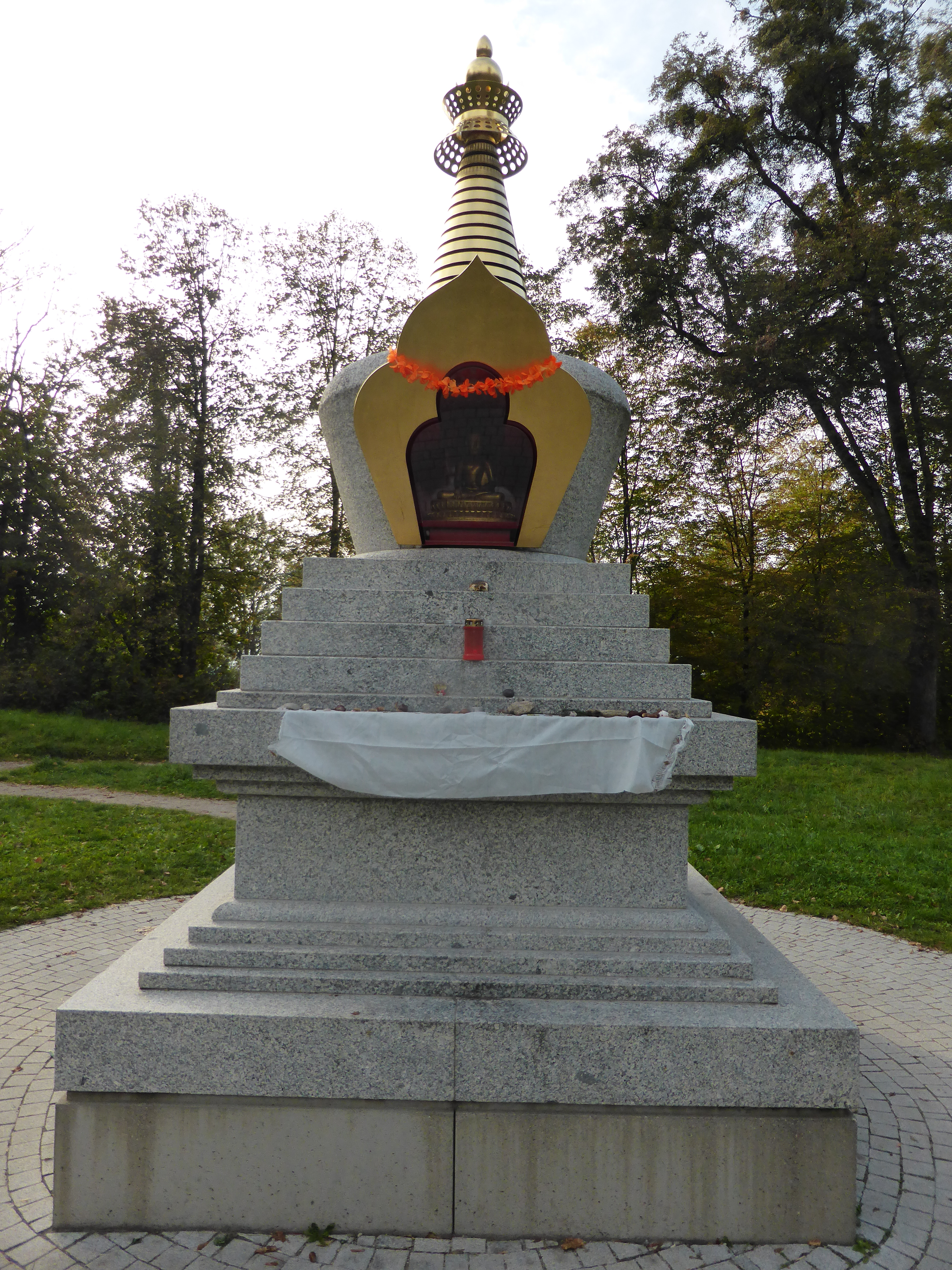 Stupa auf dem Mönchsberg